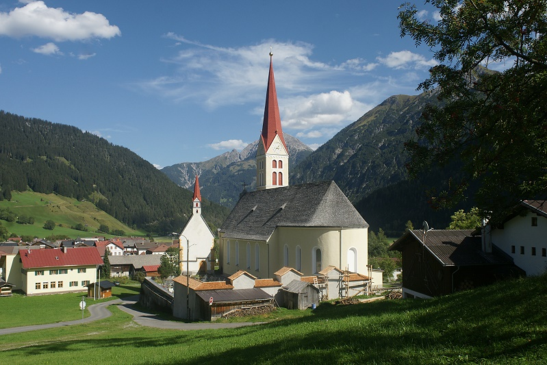 Kath. Pfarrkirche Unsere Liebe Frau Mariae Himmelfahrt, Friedhof mit Sebastianskapelle u. Kriegerdenkmal von Gföll aus gesehen